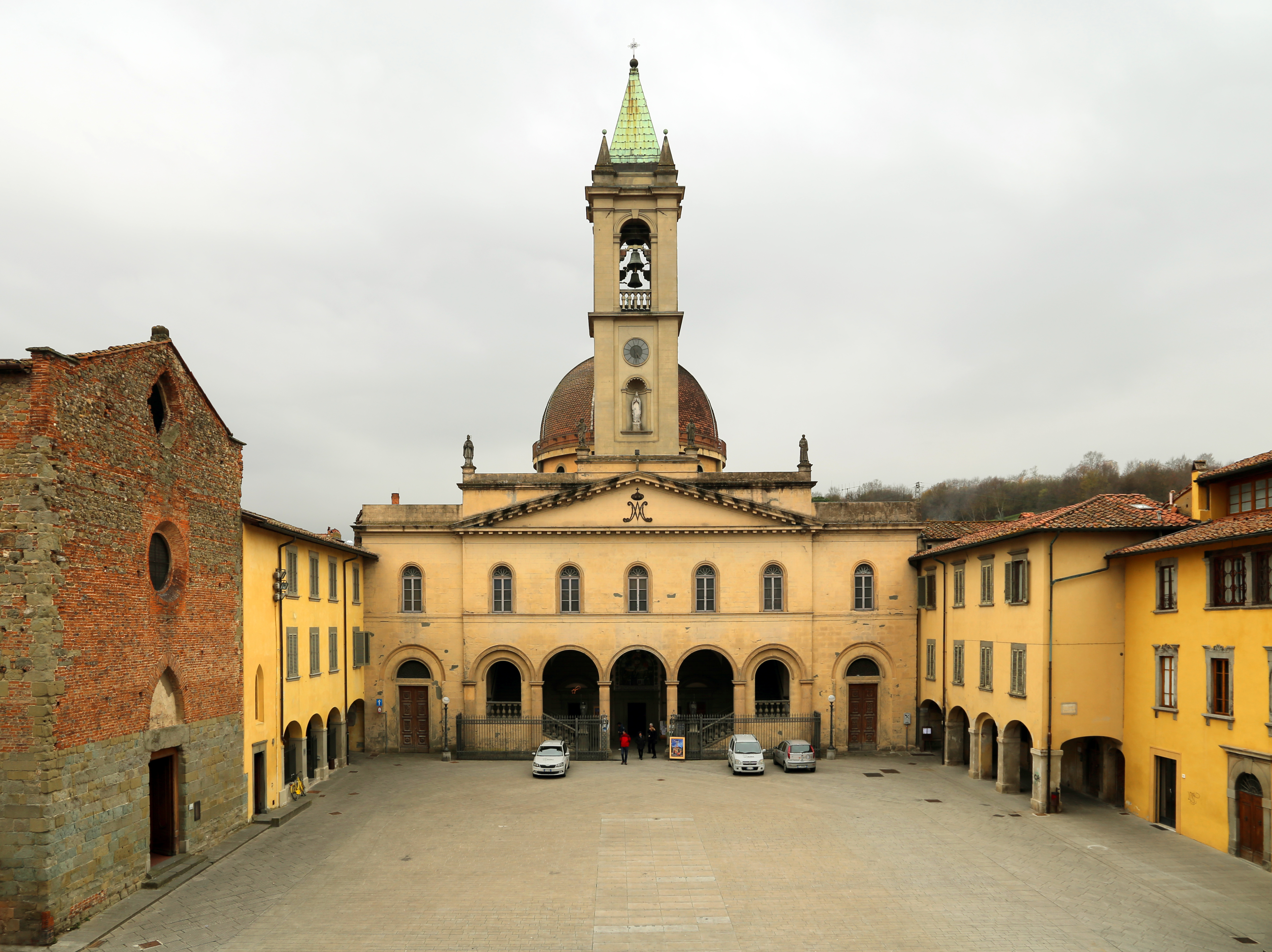 Palazzo d'Arnolfo This is a photo of a monument which is part of cultural heritage of Italy.